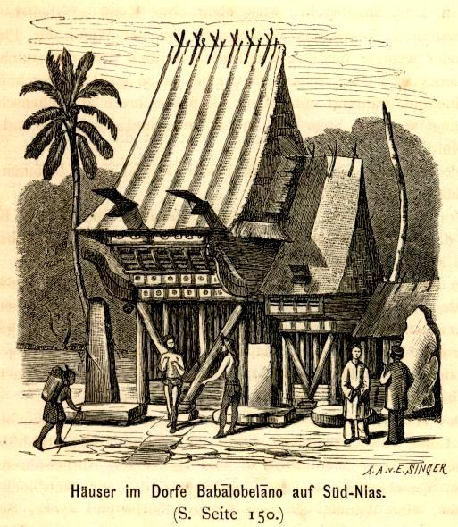 Haus in Südnias